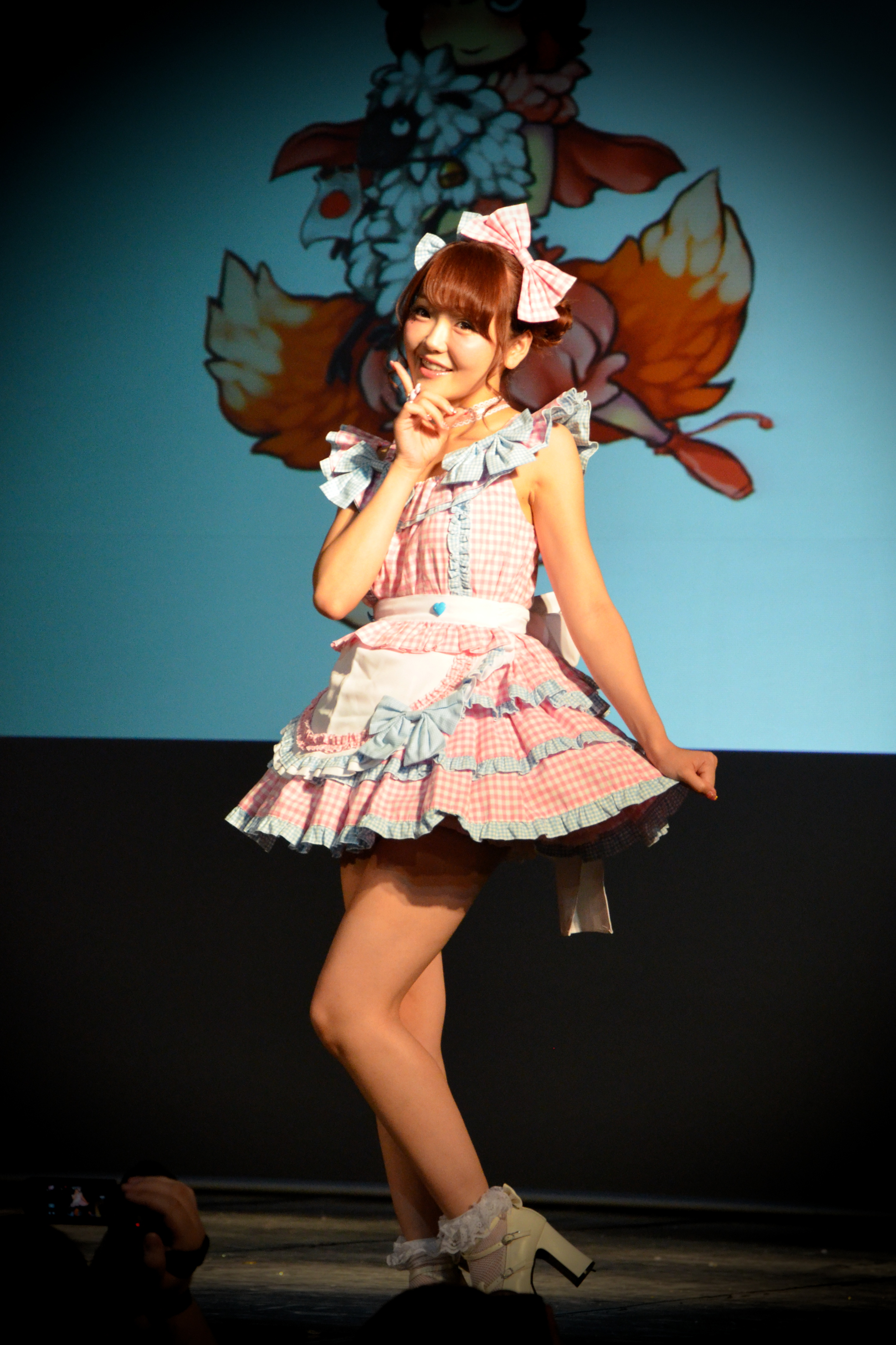 Hitomi